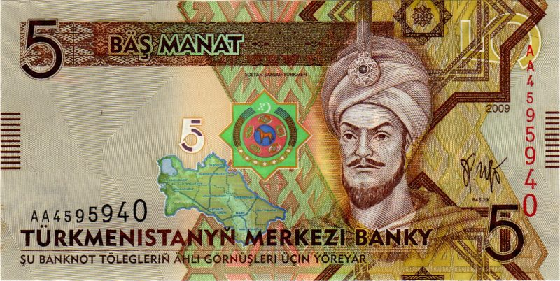 5 manat. Türkmenistan